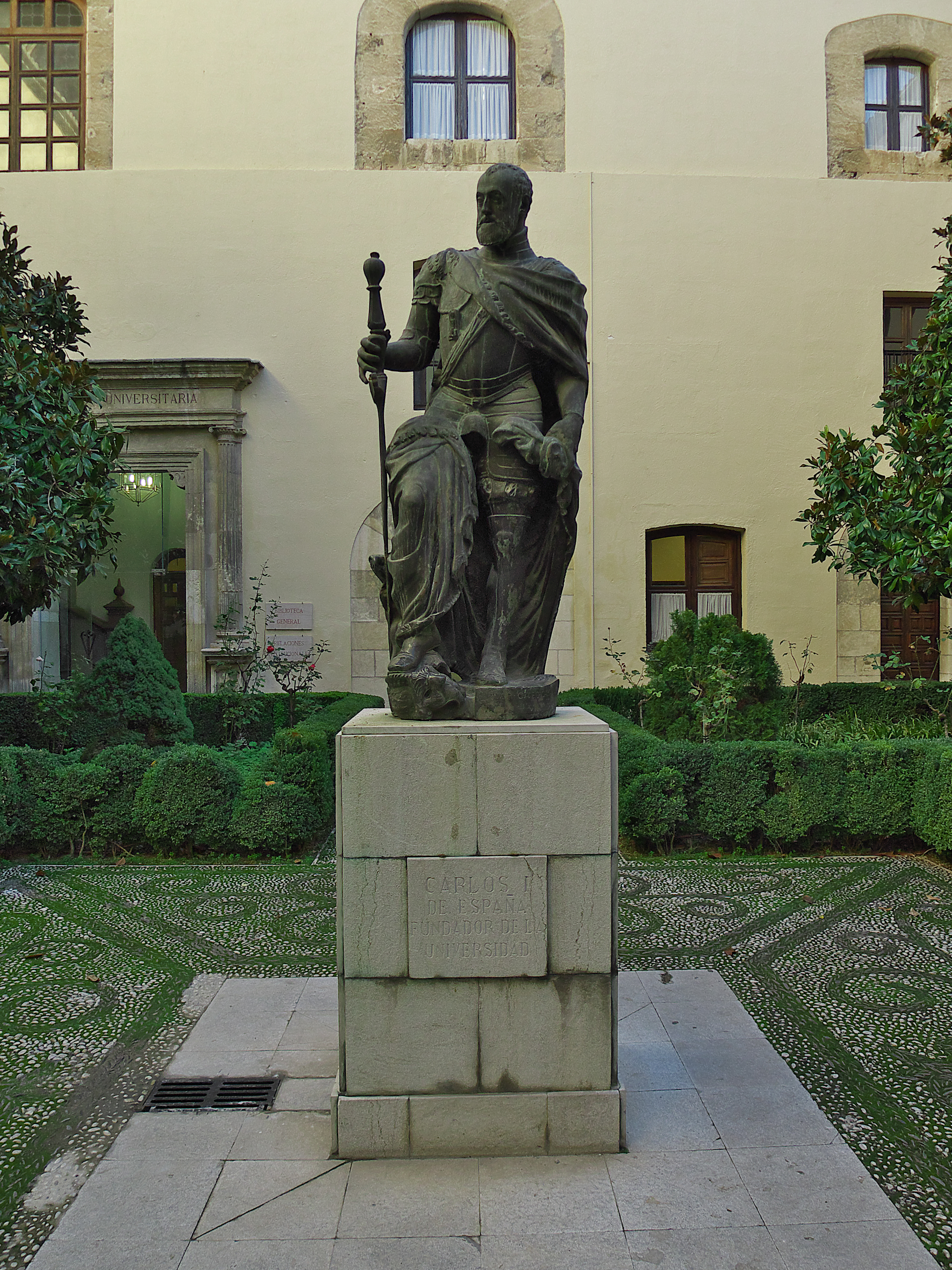 Patio del Archivo. Hospital Real de Granada. Carlos I de España funda la Universidad de Granada (1531).